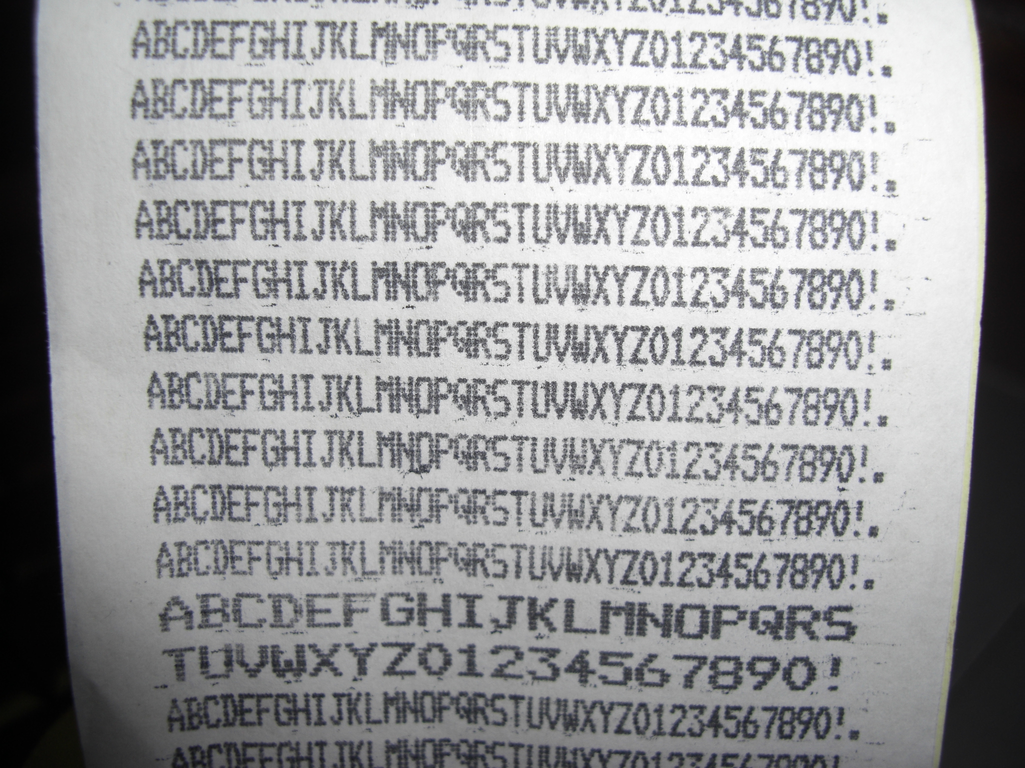 Testdruck eines Bondruckers (CITIZEN CBM-910), mit nachgetränktem Farbband